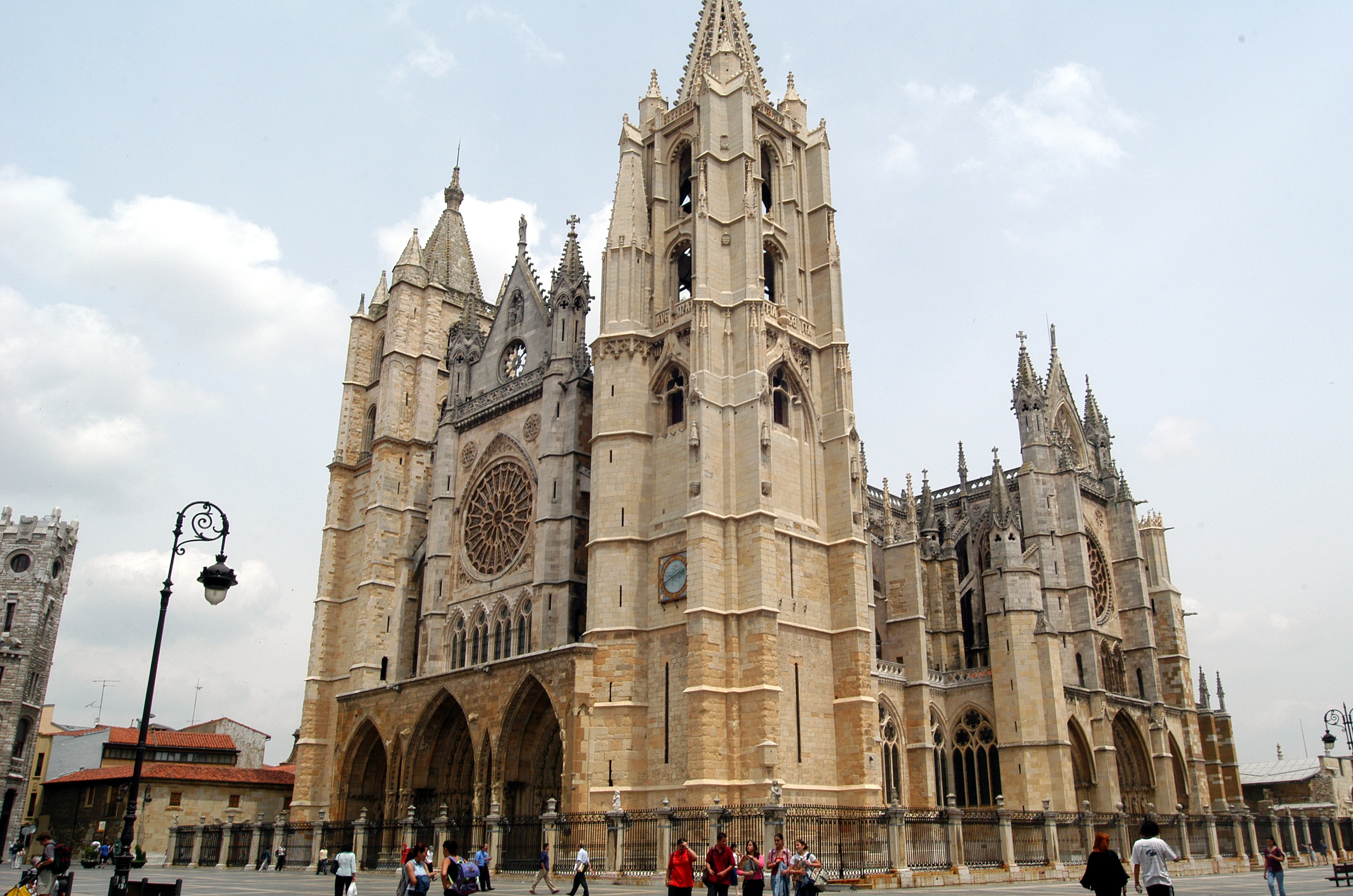 Catedral de León vista clásica